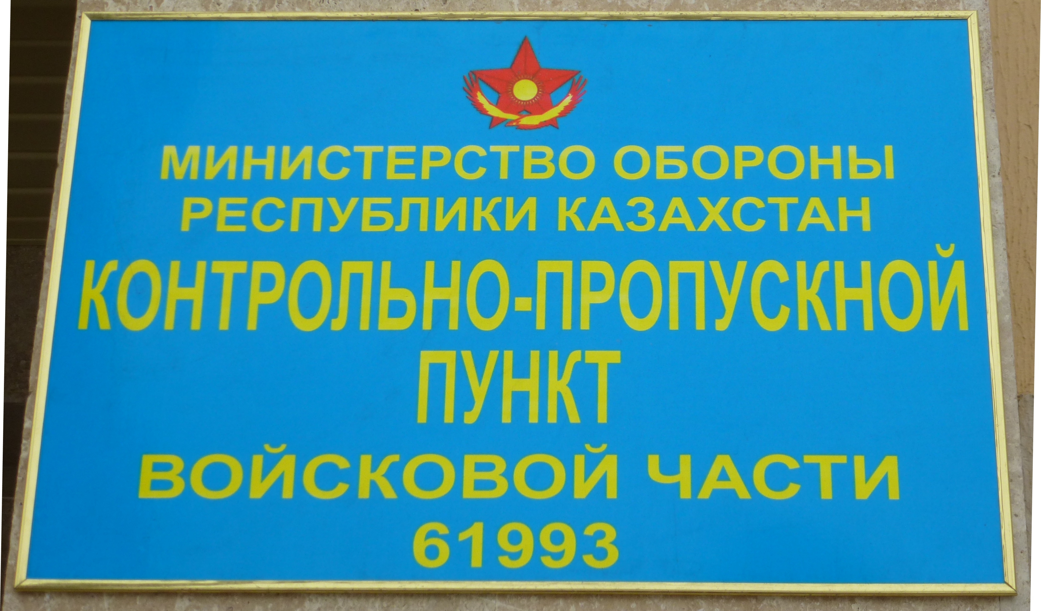 Табличка на Контрольно-Пропускном Пункте с указанием Войсковой части 61993 - 38-й отдельной десантно-штурмовой бригады Вооружённых Сил Республики Казахстан.